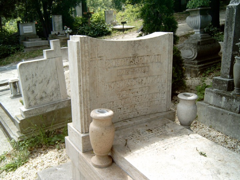 Boldizsár Iván (Budapest, 1912. október 30. – Budapest, 1988. december 22.) író, publicista sírja Budapesten. Farkasréti temető: 22/1-1-62